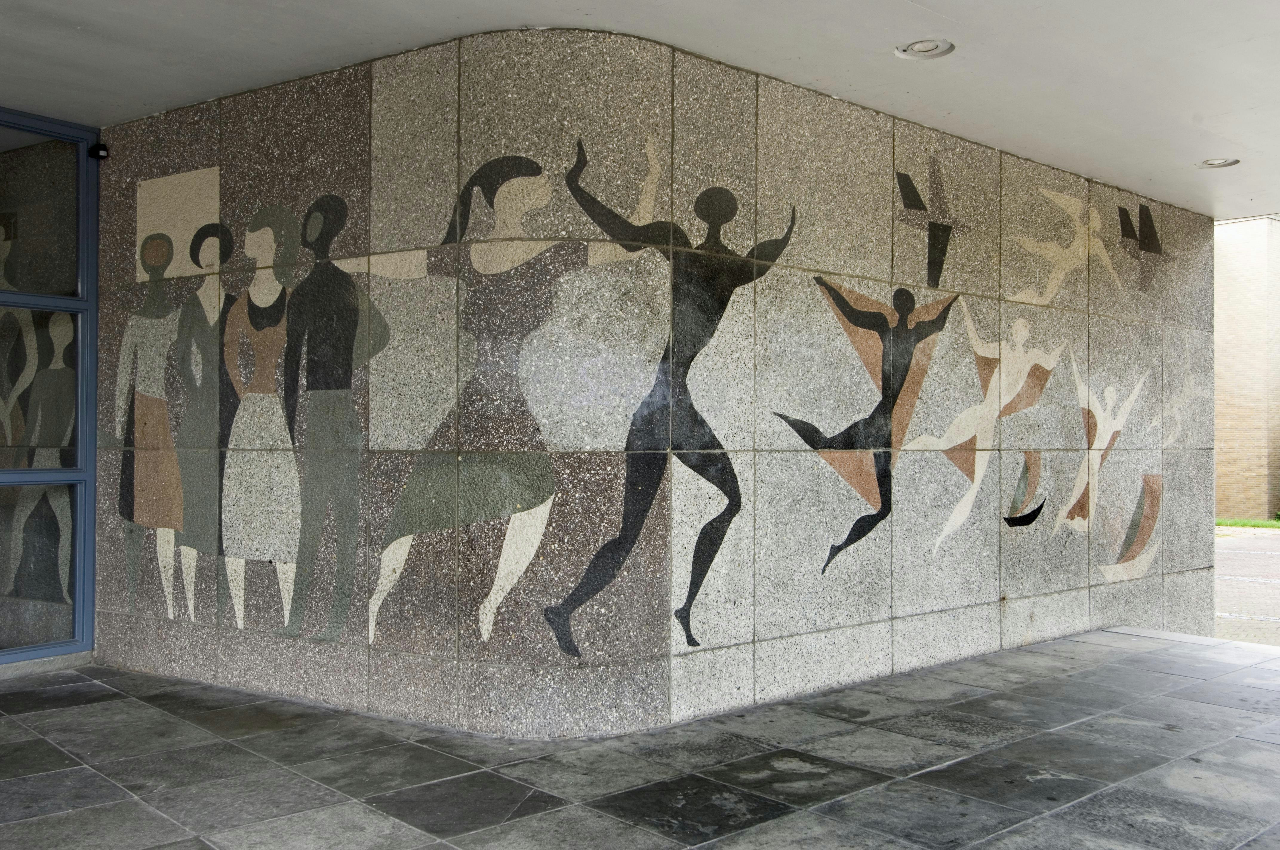 Grotiuslyceum: Detail ingangspartij, muurschildering (opmerking: Gefotografeerd voor Monumenten van Herrezen Nederland)